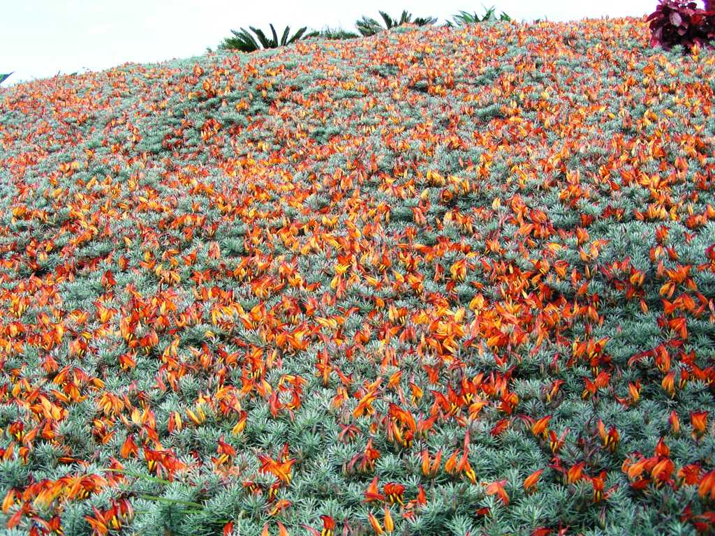 Kanarischer Hornklee